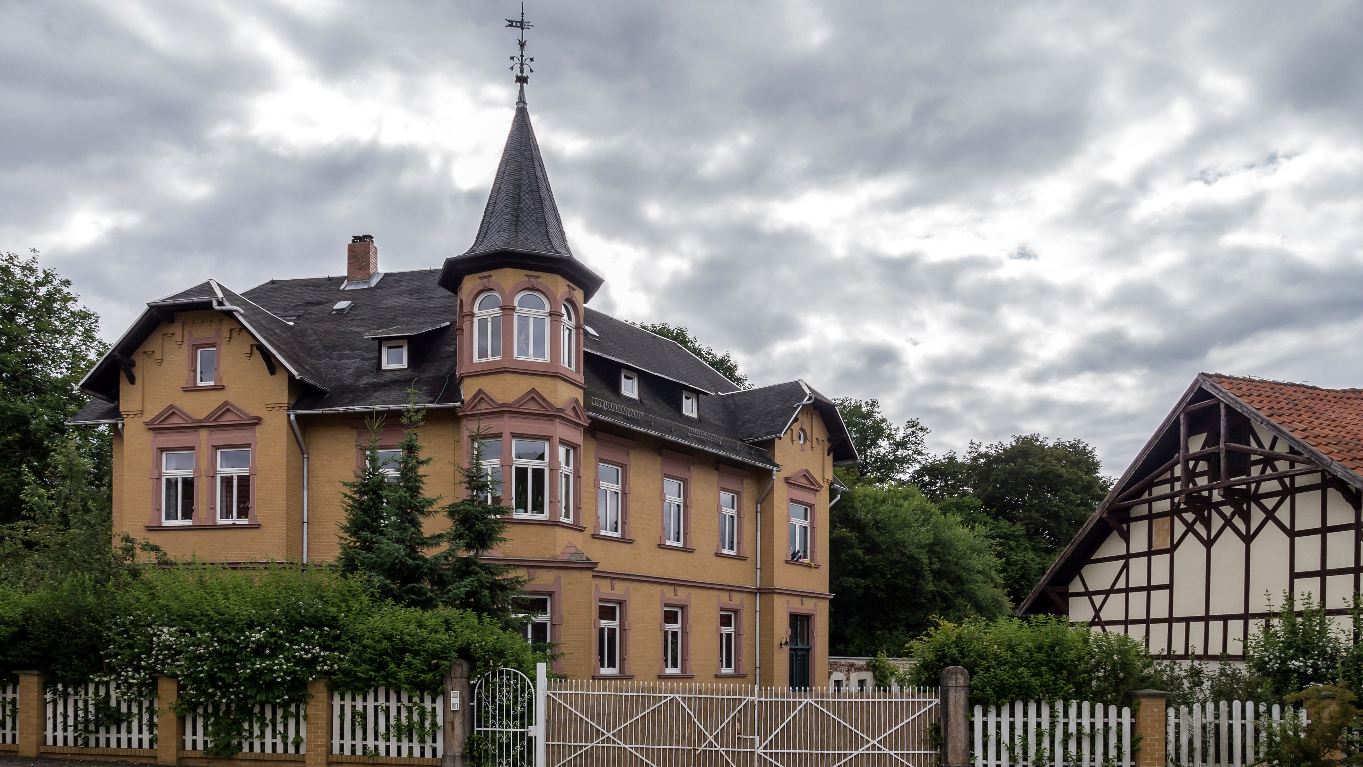 Kulturdenkmal in Bechstedt ehemaliges Rittergut Ortsstraße 31,Landkreis Saalfeld-Rudolstadt